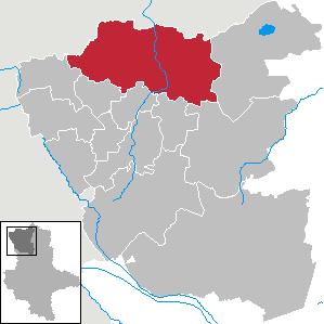 (Original text: Salzwedel im Landkreis Salzwedel)